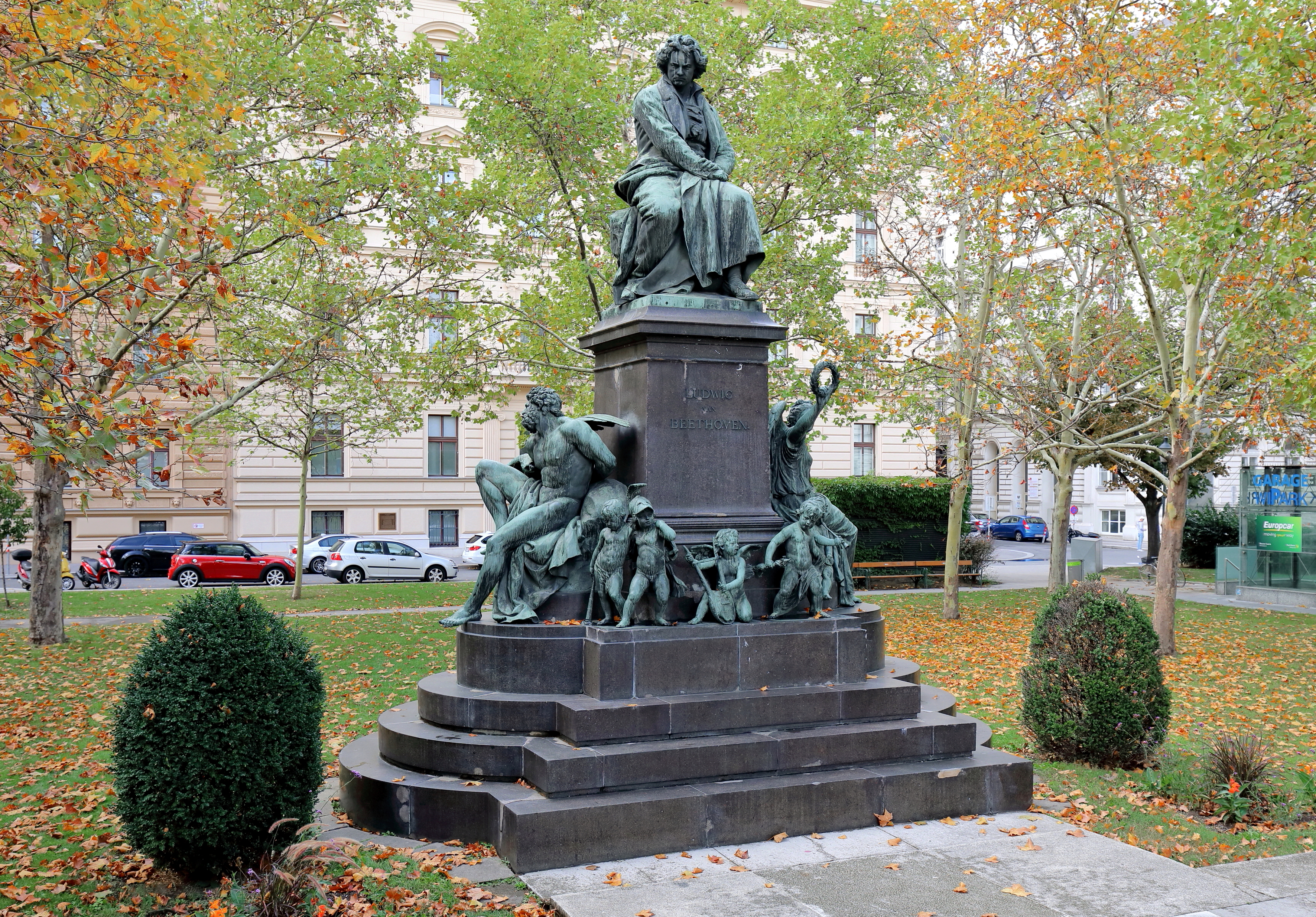 Das Beethoven-Denkmal am Beethovenplatz im 1. Wiener Gemeindebezirk Innere Stadt.Das Bronzestandbild wurde zu Ehren von Ludwig van Beethoven errichtet, von dem Bildhauer Caspar von Zumbusch realisiert und am 1. Mai 1880 enthüllt. Es zeigt den sitzenden Beethoven über mehrstufigem, seitlich gerundetem Postament. Zu seinen Füßen der gefesselte Prometheus (links) und Victoria mit erhobenem Lorbeerkranz (rechts) sowie neun musizierende Putten als Allegorien zu seinen 9 Sinfonien.